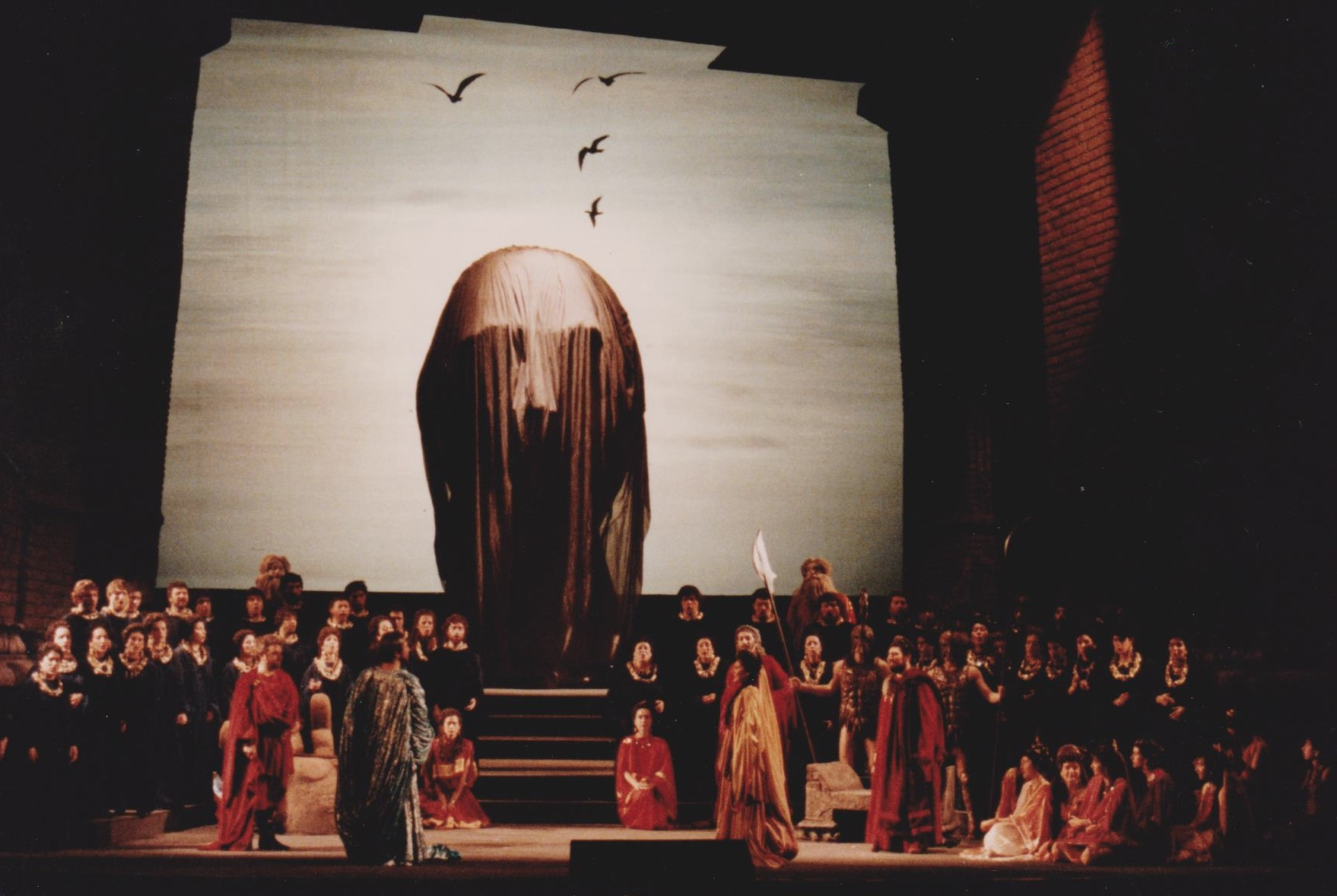 L'Idoménée de Mozart représenté au Teatro Bellini de Catane dans une mise en scène de Claude d'Anna. Décor Giantito Burchiellaro, costumes Yvan Stefanutti.